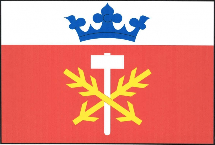 Vlajka,Prachovice , okres Chrudim